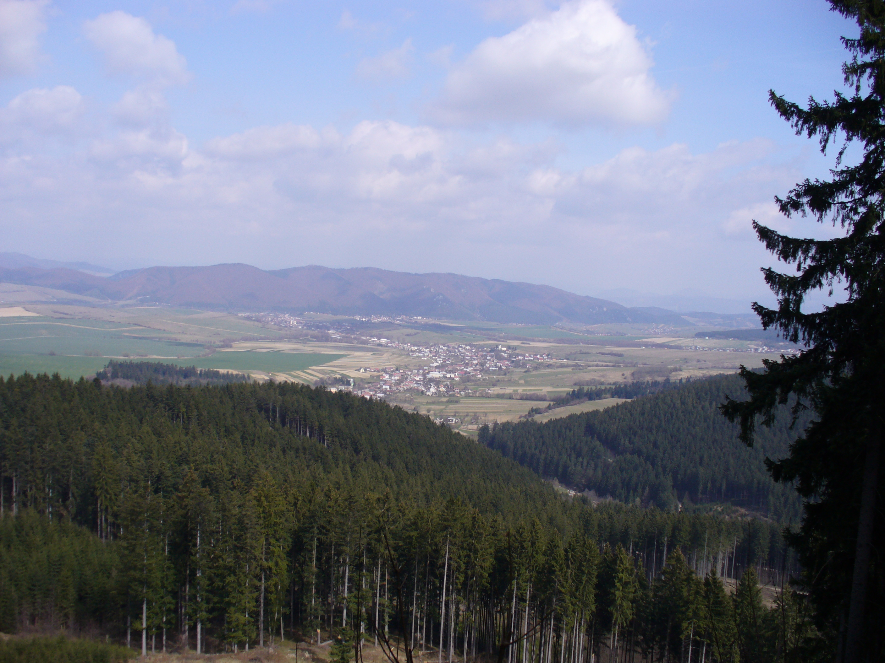 Obec Kamenná Poruba v okrese Žilina z úpätia hory Sokol. V pozadí Rajecké Teplice